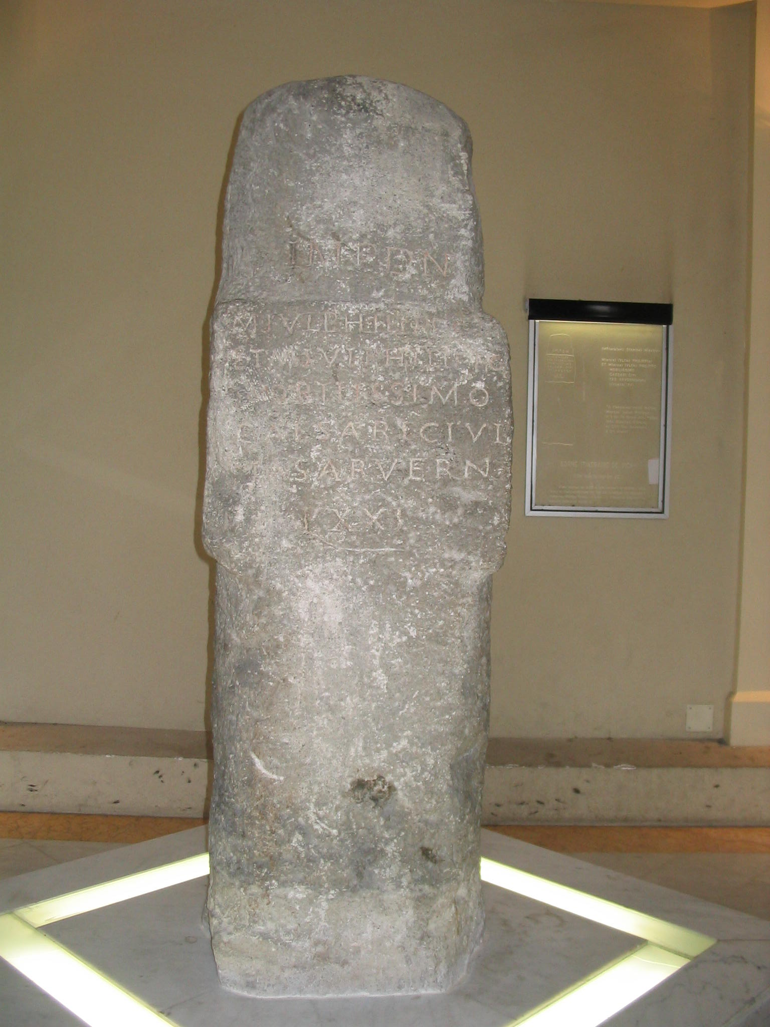 Miliario del emperador romano Filipo el árabe procedente de Vichy (Francia)